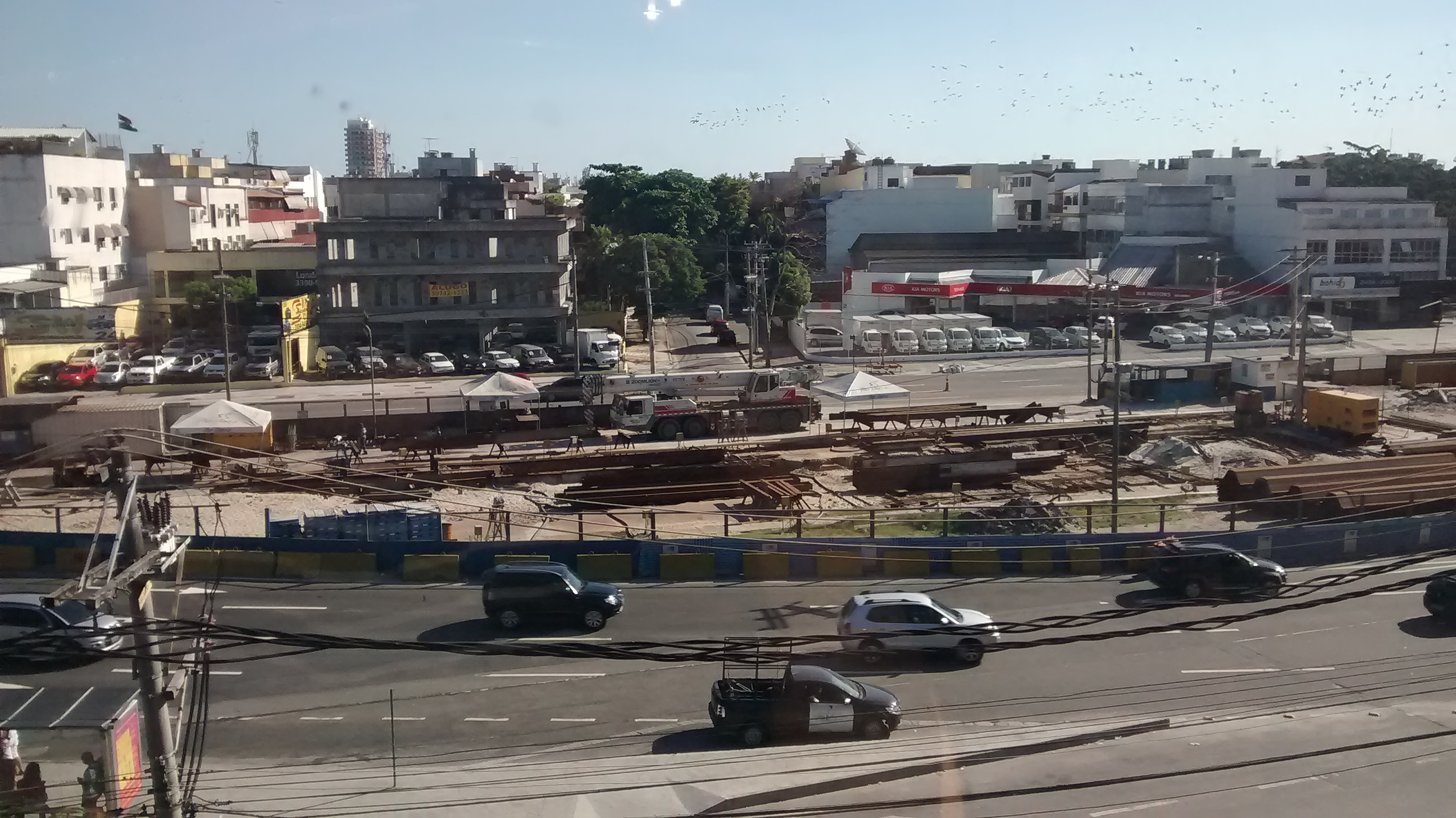 Vista do Jardim Oceânico em obras para implantação da estação do Metrô.